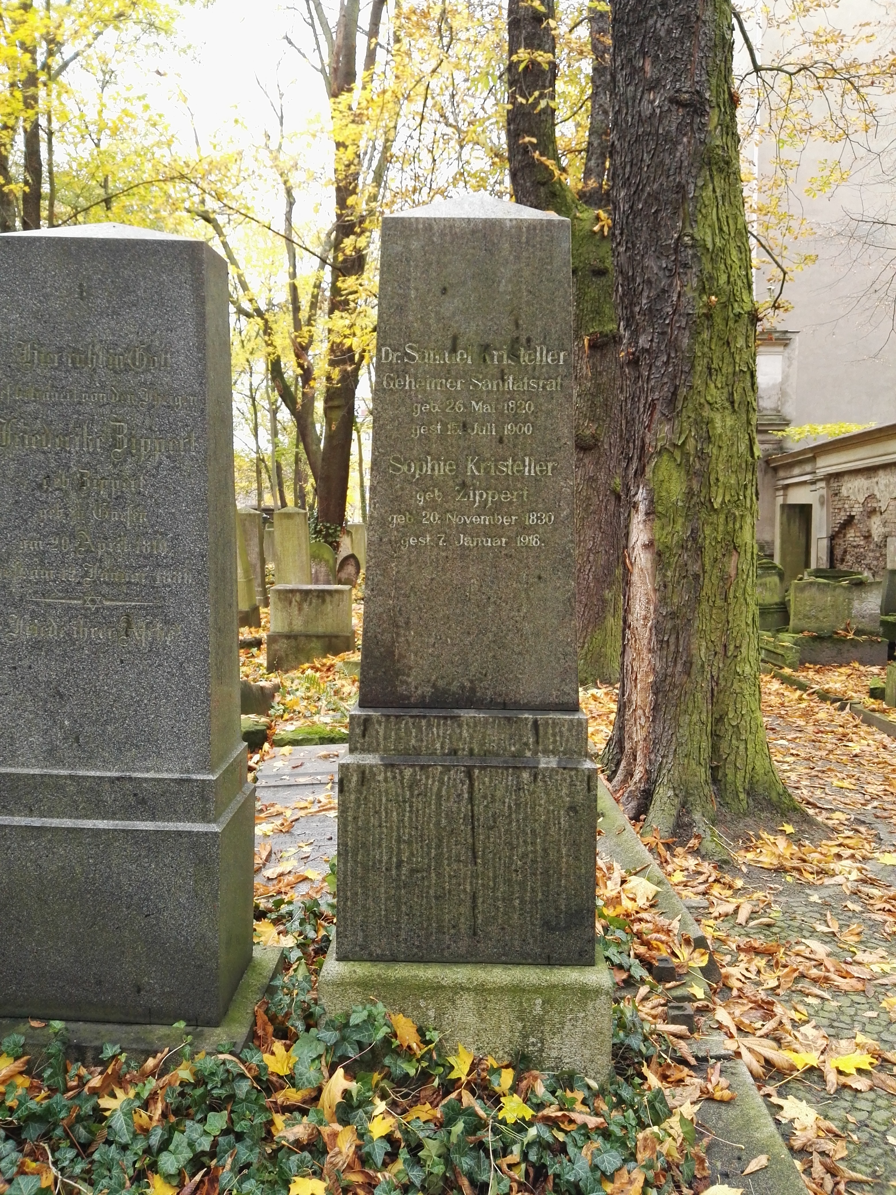 Grab von Samuel Kristeller auf dem Jüdischer Friedhof Schönhauser Allee in Berlin-Prenzlauer Berg